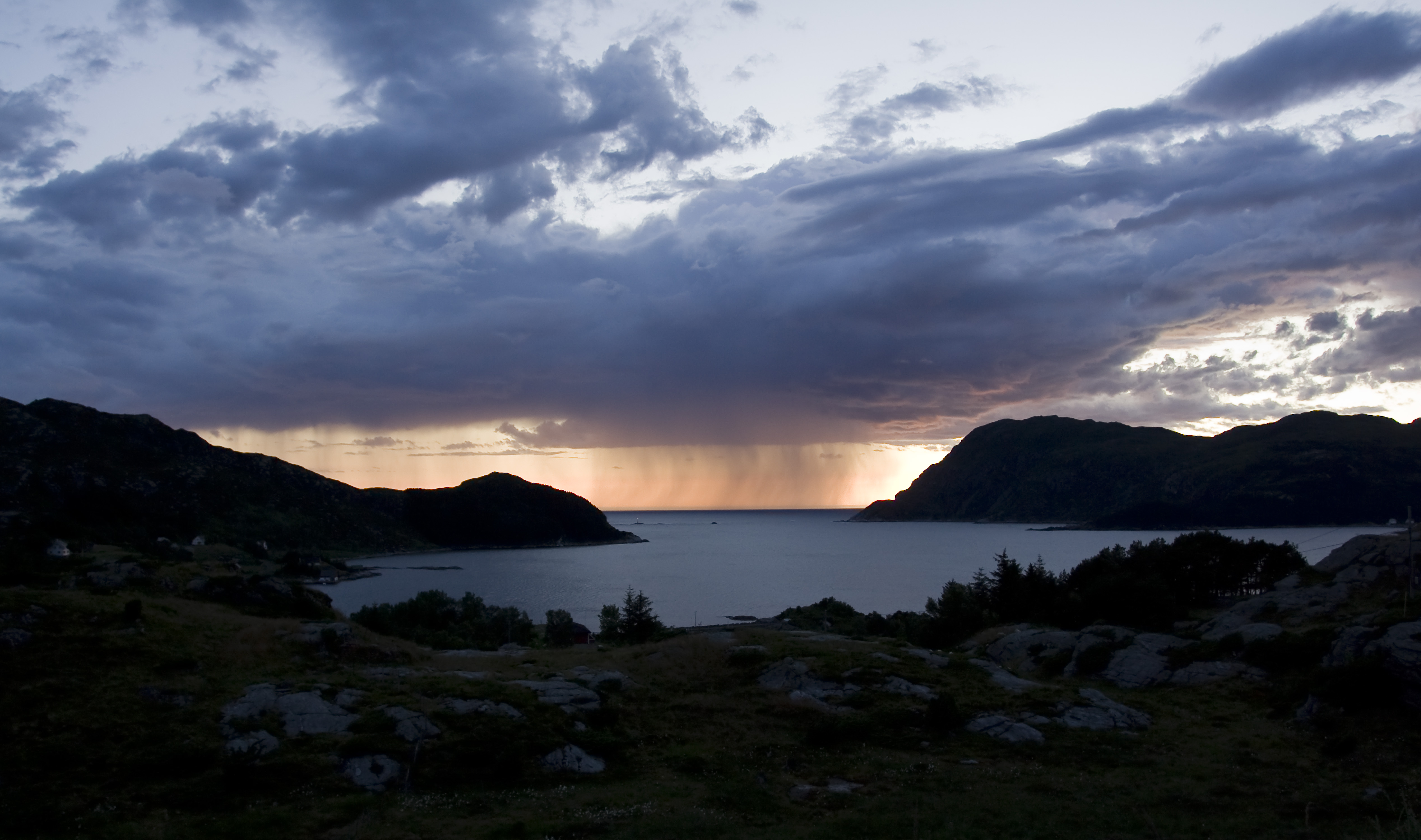 Vaagsfjorden i Nordfjord frå Husevåg på Husevågøy. From Husevåg in Norway.